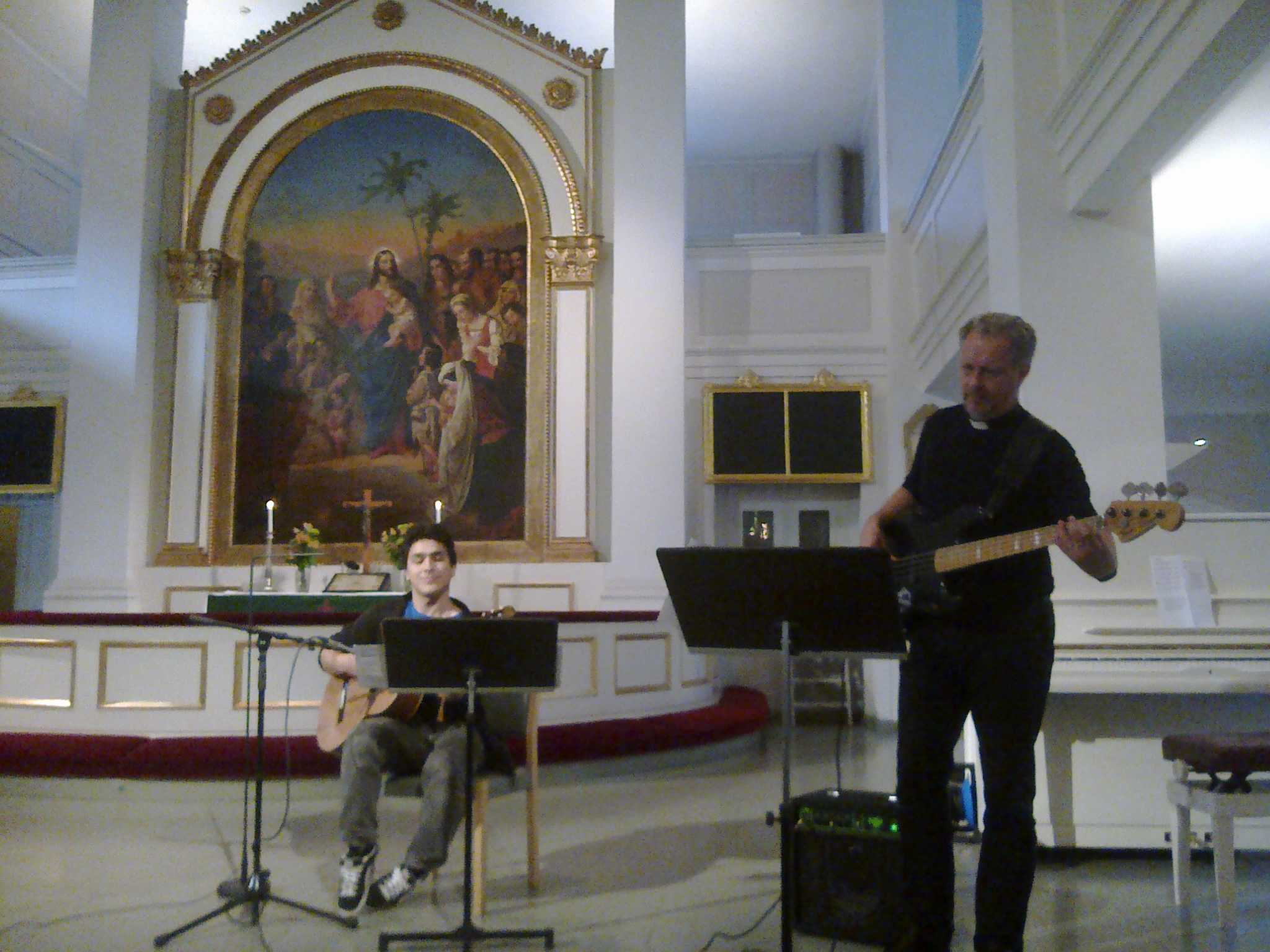 Pastori Arto Antturi bassolla